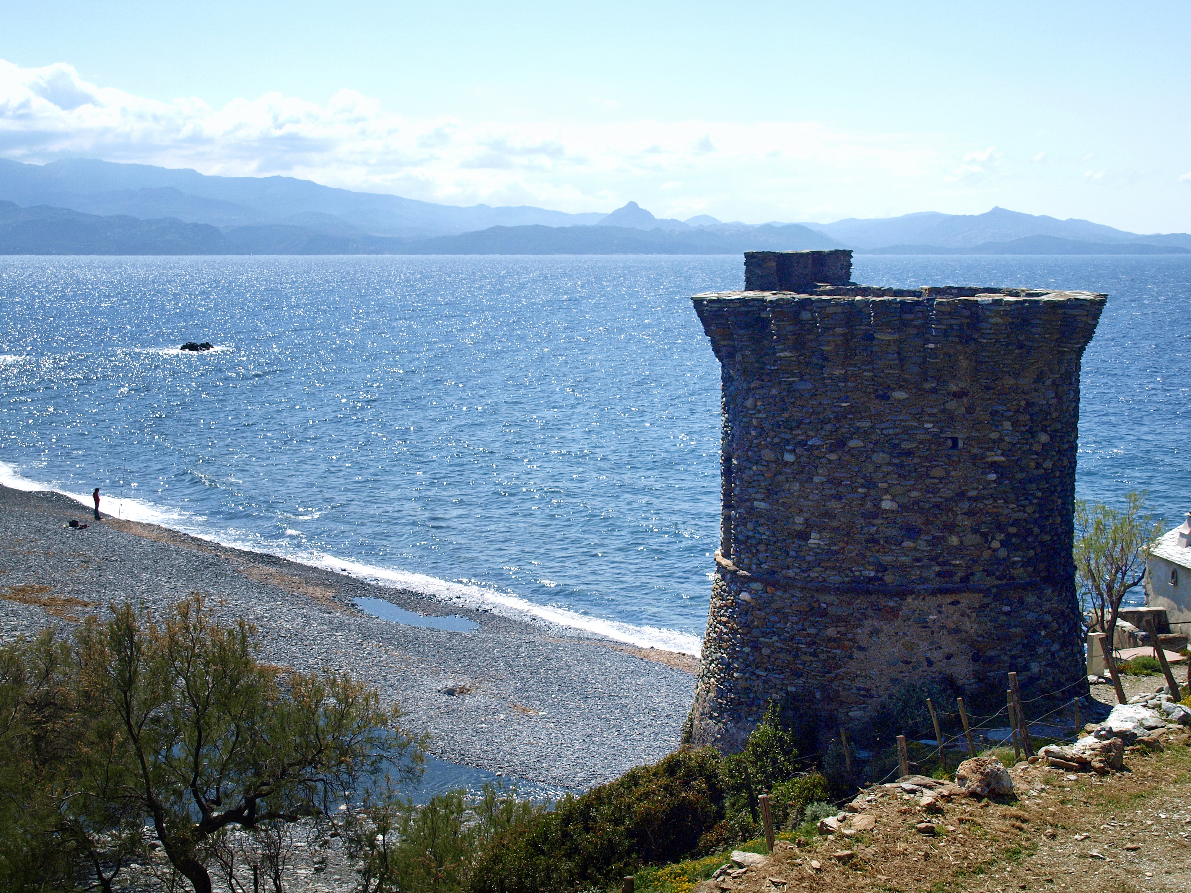 Olmeta-di-Capocorso, Cap Corse (Corse) - Marine de Negro, sa tour, sa plage, sur fond de Désert des Agriates